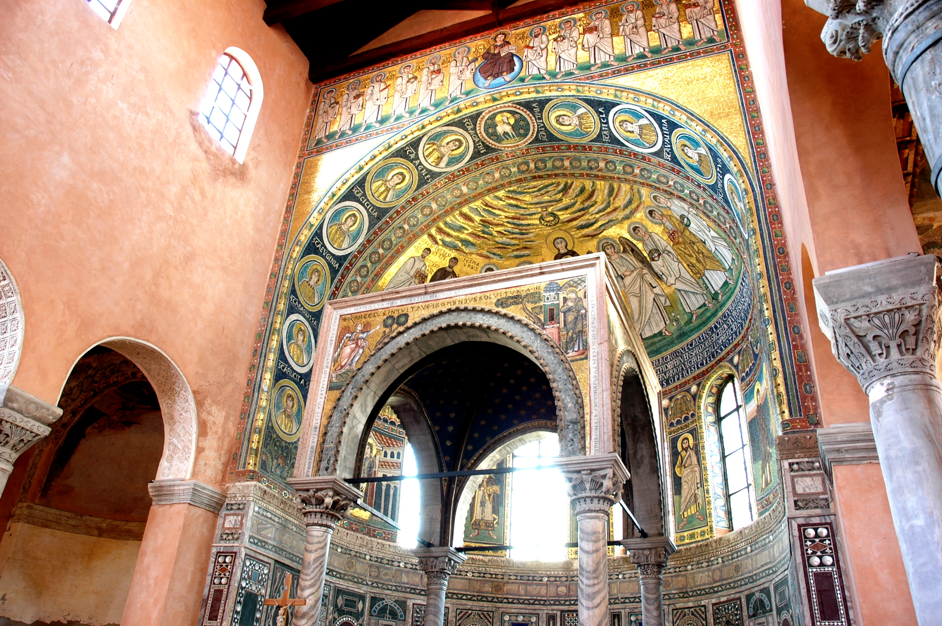 Poreč - Basílica Eufrasiana - Cibori